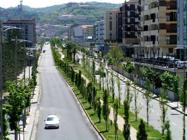 viale giacomo mancini a cosenza, l'arteria che unirà l'area urbana collegando cosenza a rende e montalto uffugo